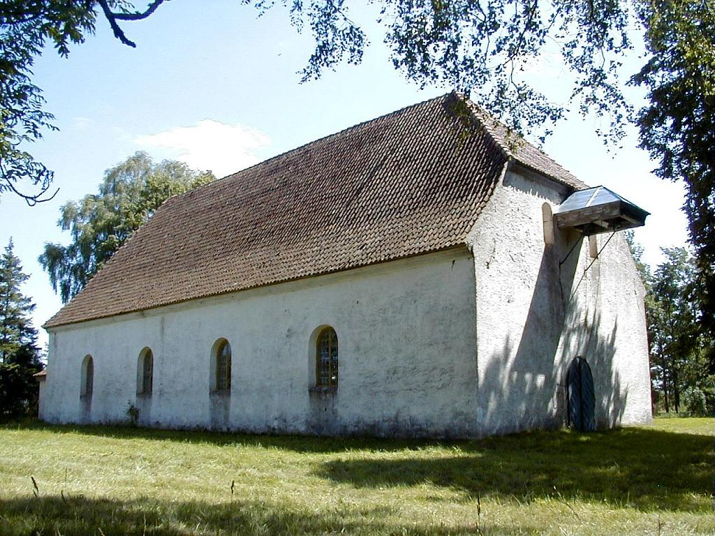 Užavas baznīca 2002-07-10